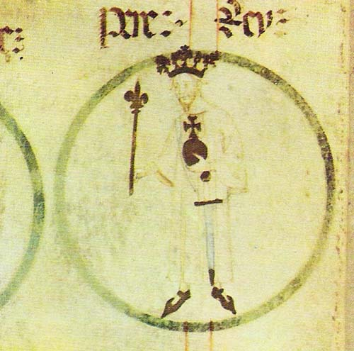 Rotlle genealògic del Monestir de Poblet